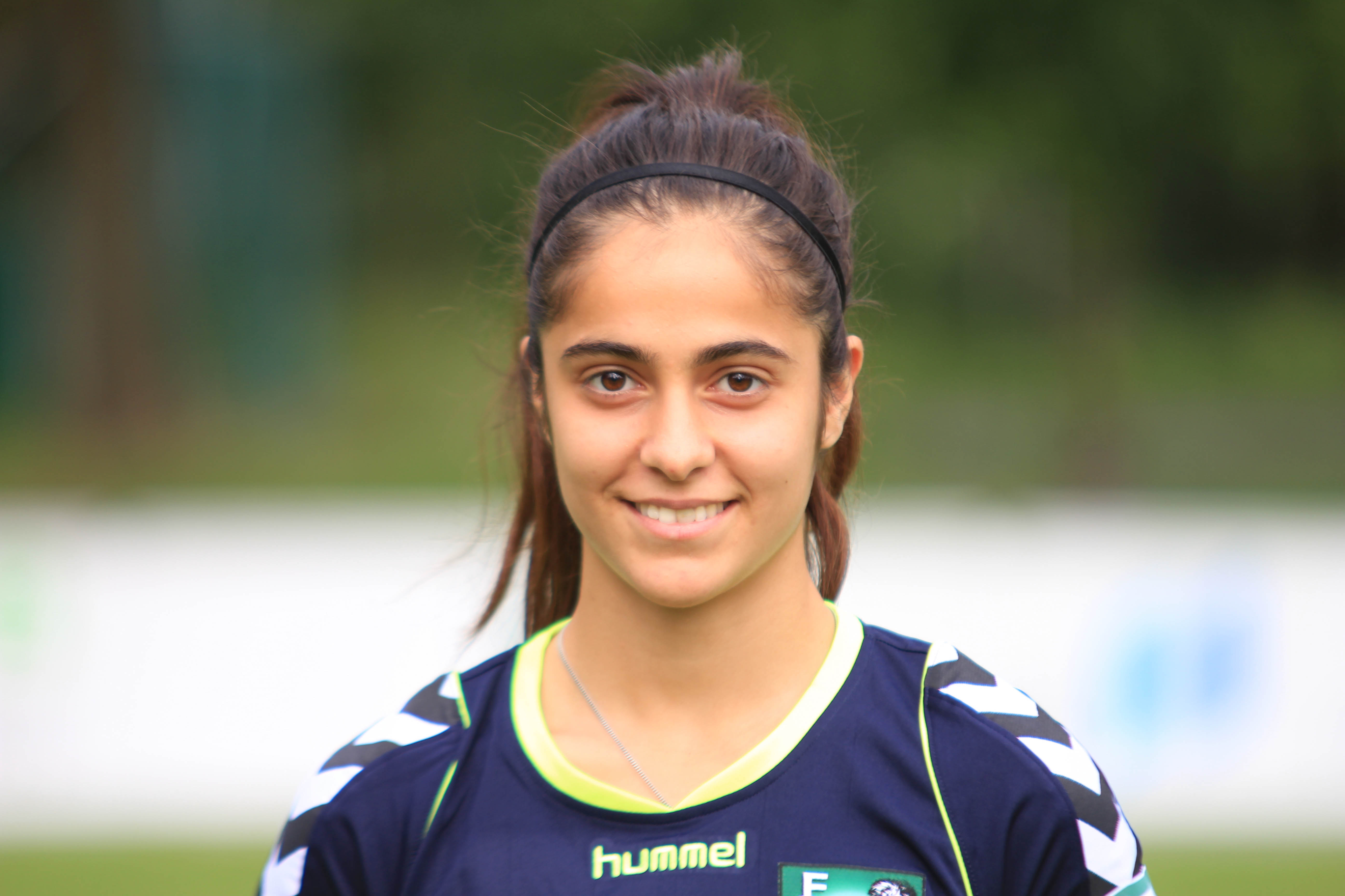 Gurbet Kalkan, FCR 2001 Duisburg